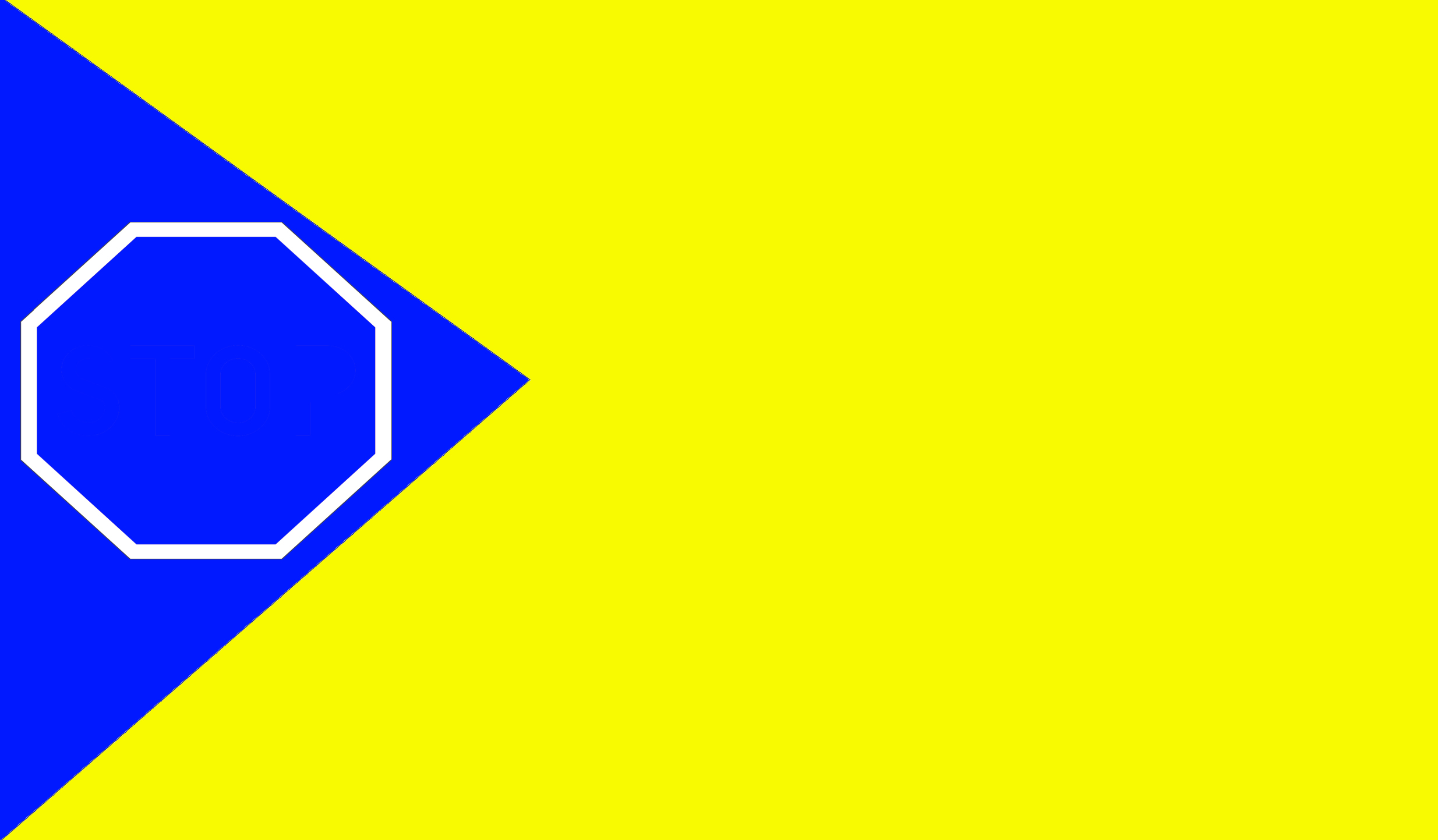 Bandera de Pesé